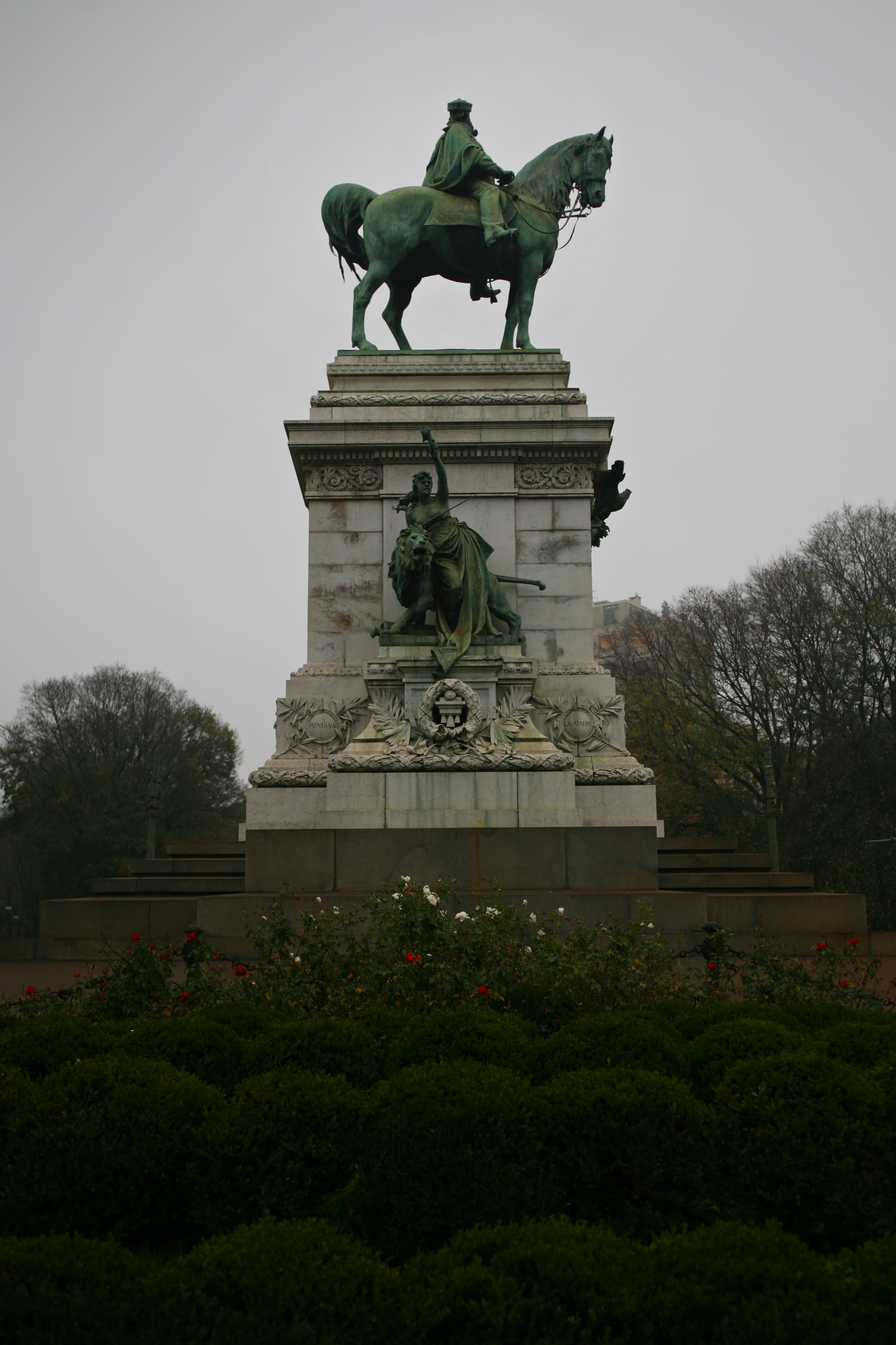 Statua equestre di Giuseppe Garibaldi in Largo Cairlo, Milano: scultore Ettore Ximenes, basamento dell'arch, Augusto Guidini